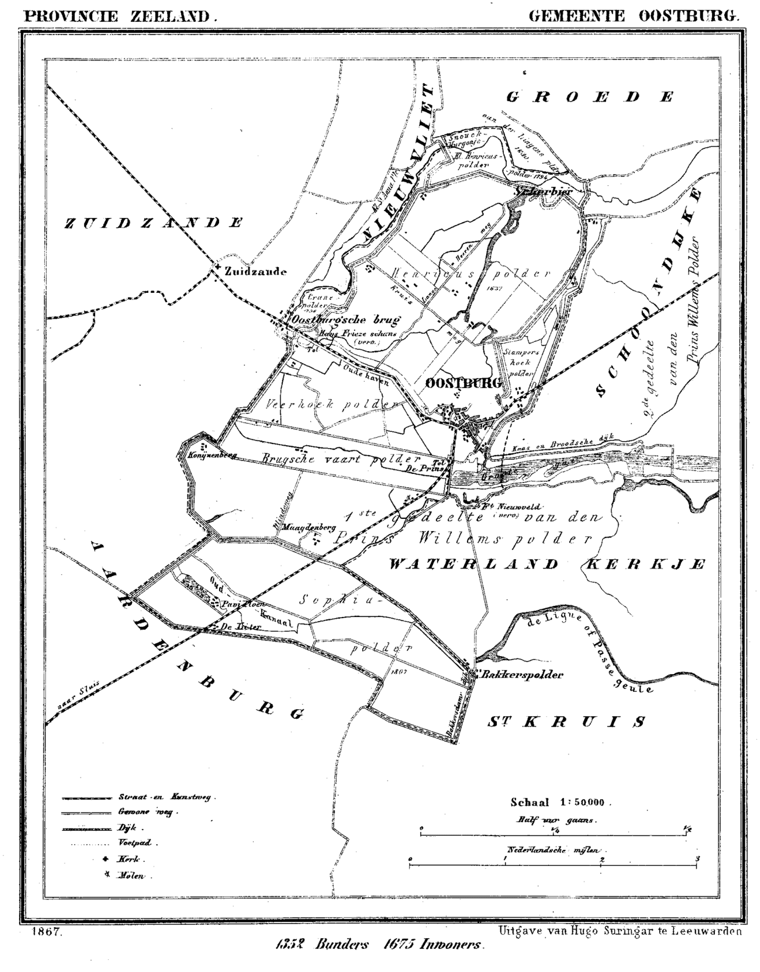 Gemeente Oostburg, Zeeland, Nederland